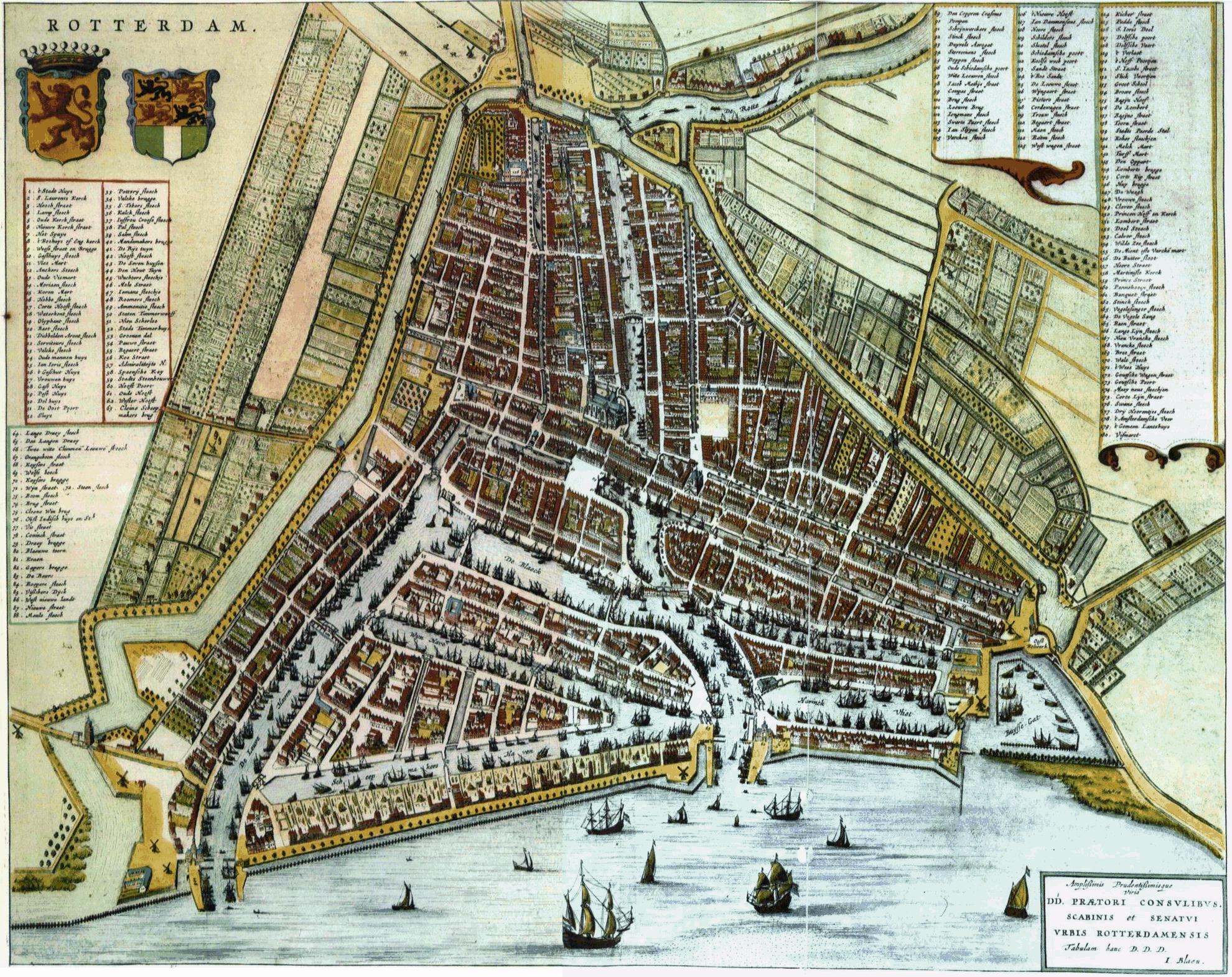 Rotterdam